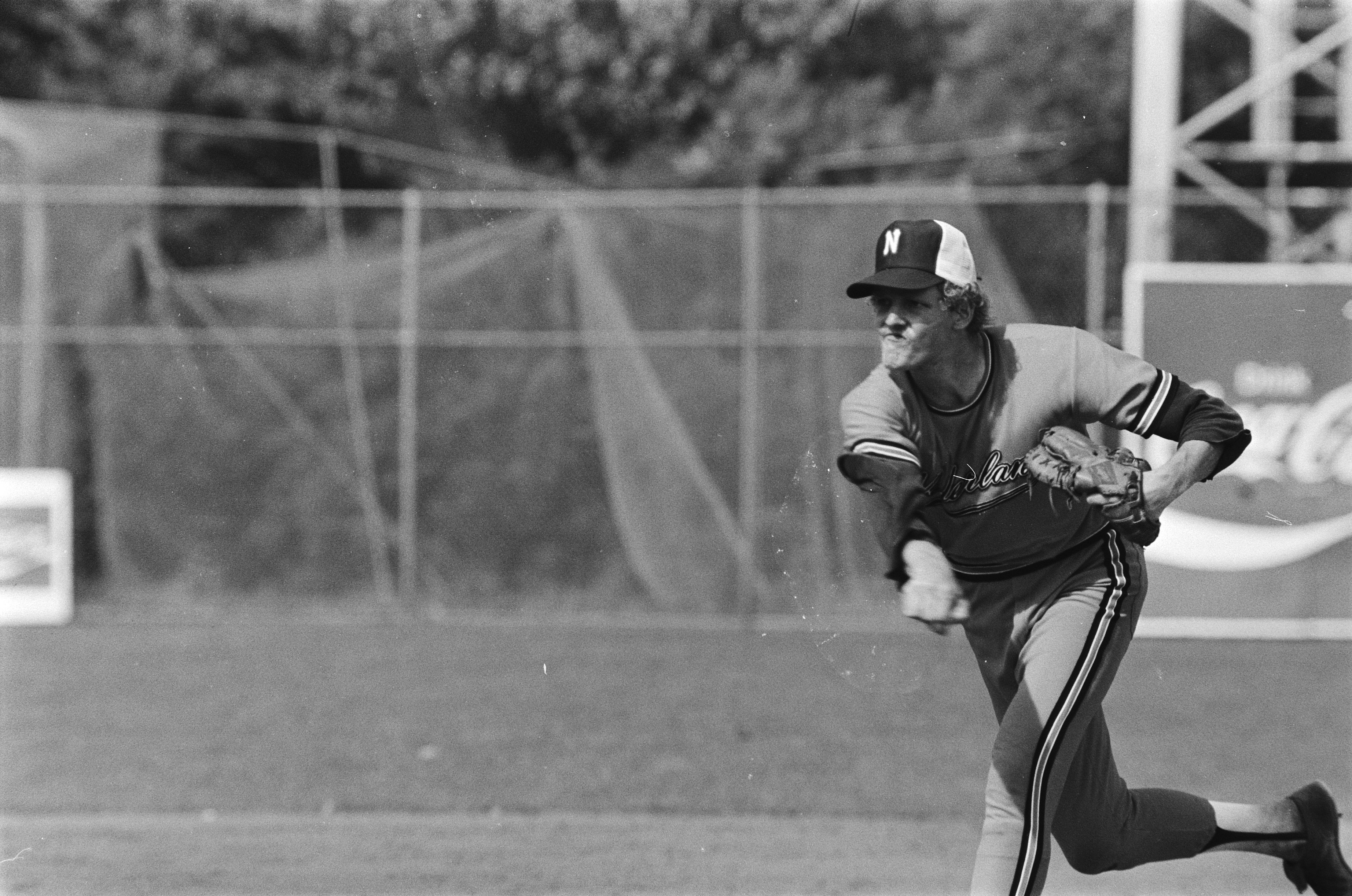 Collectie / Archief : Fotocollectie Anefo Reportage / Serie : [ onbekend ] Beschrijving : Haarlemse honkbalweek Nederland tegen Japan; pitcher Martin Ronnenbergh in actie Datum : 20 augustus 1978 Locatie : Haarlem, Japan Trefwoorden : honkbal, sport Persoonsnaam : Ronnenbergh, Martin Fotograaf : Suyk, Koen / Anefo Auteursrechthebbende : Nationaal Archief Materiaalsoort : Negatief (zwart/wit) Nummer archiefinventaris : bekijk toegang 2.24.01.05 Bestanddeelnummer : 929-8636